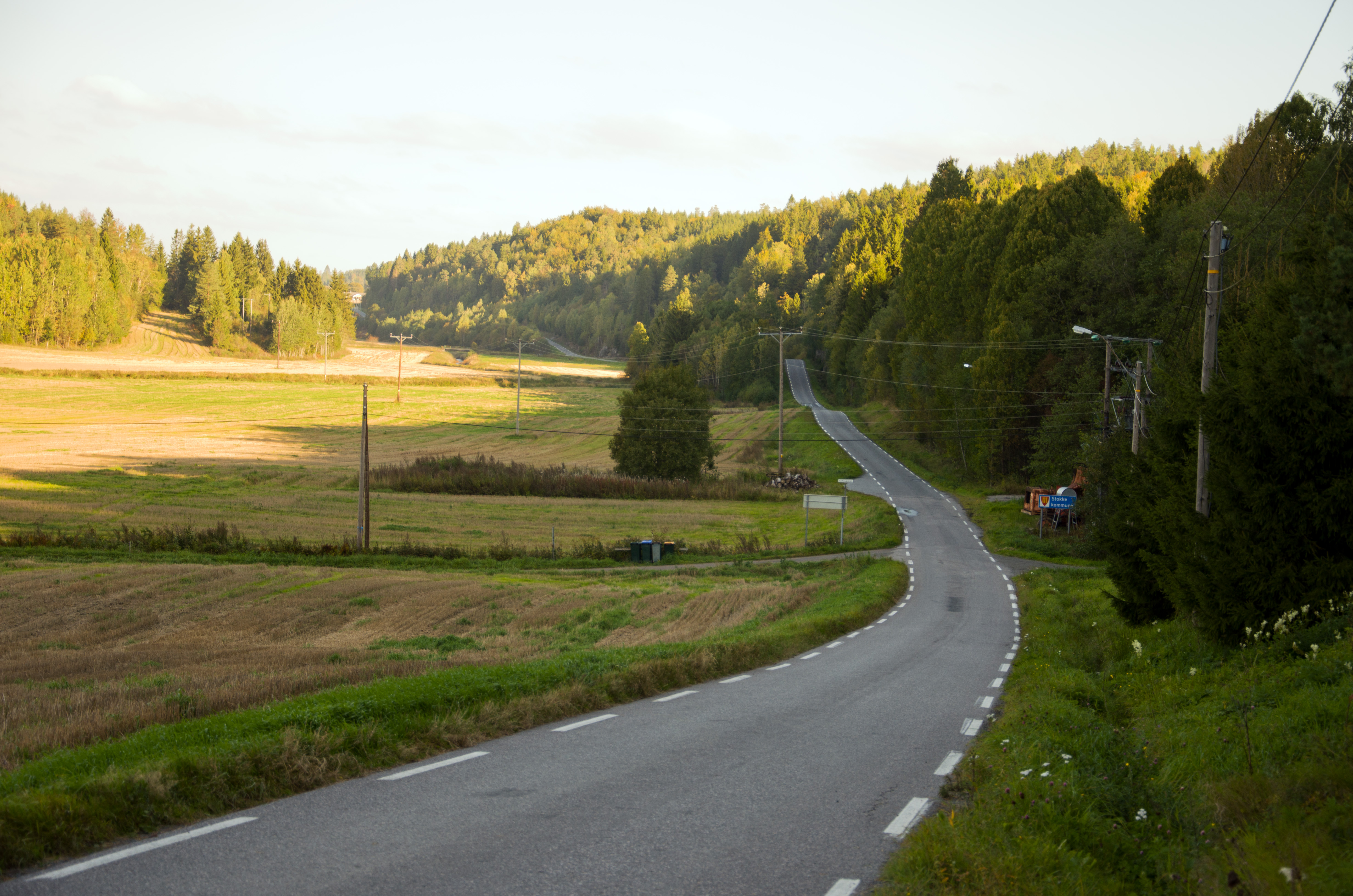 Vestfolds fylkesvei 290 Bjørndalsveien ved kommunegrensa mellom Sandefjord og Stokke.